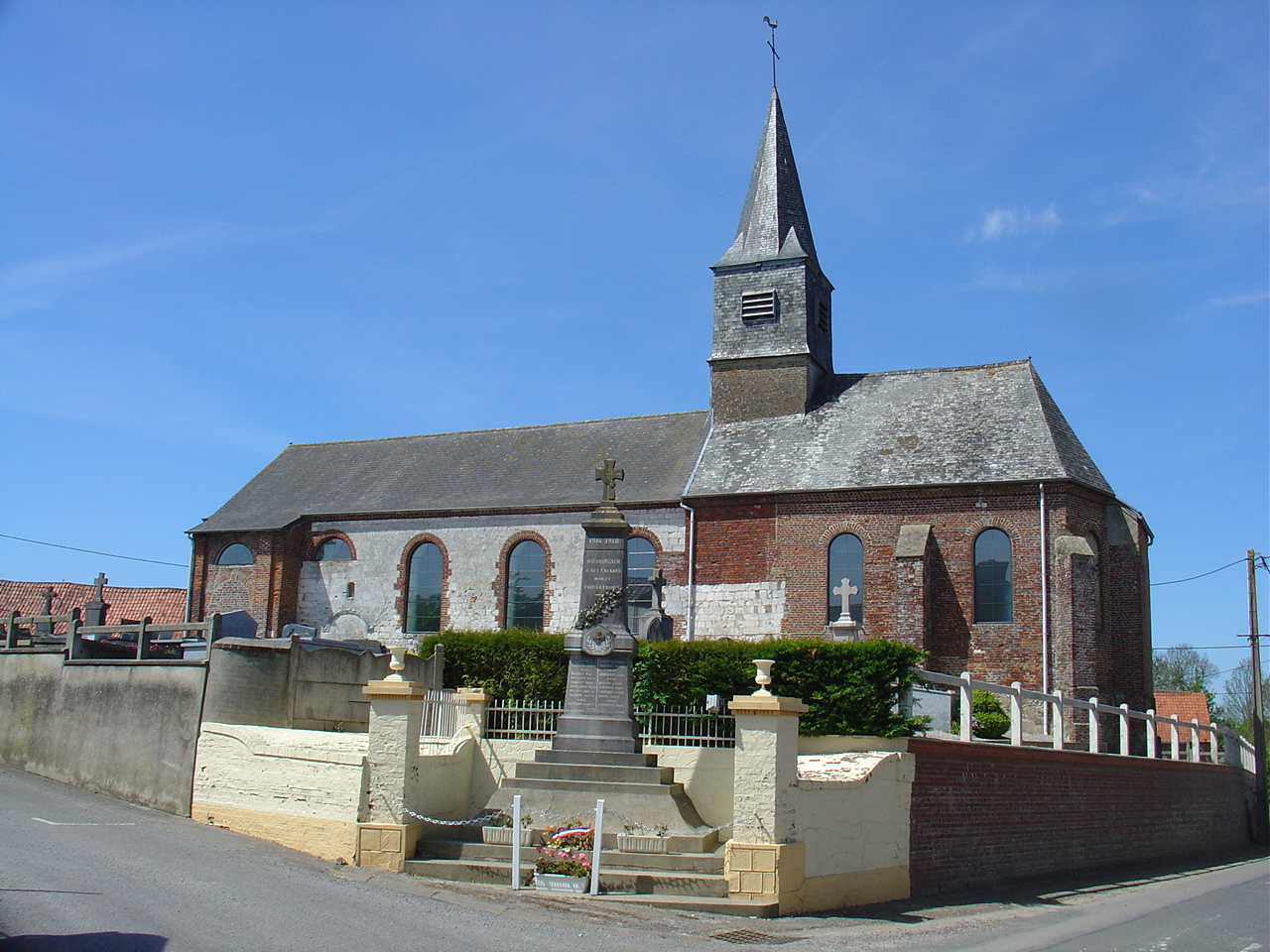 Église de Wicquinghem